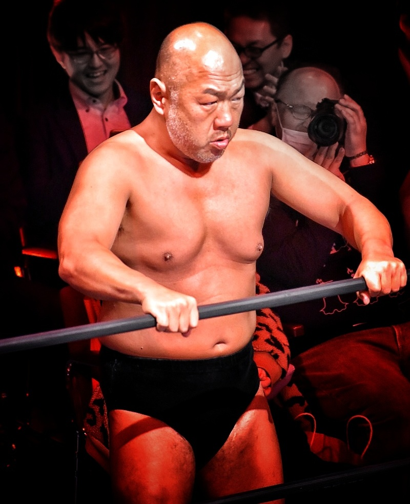 プロレスラーの高岩竜一選手